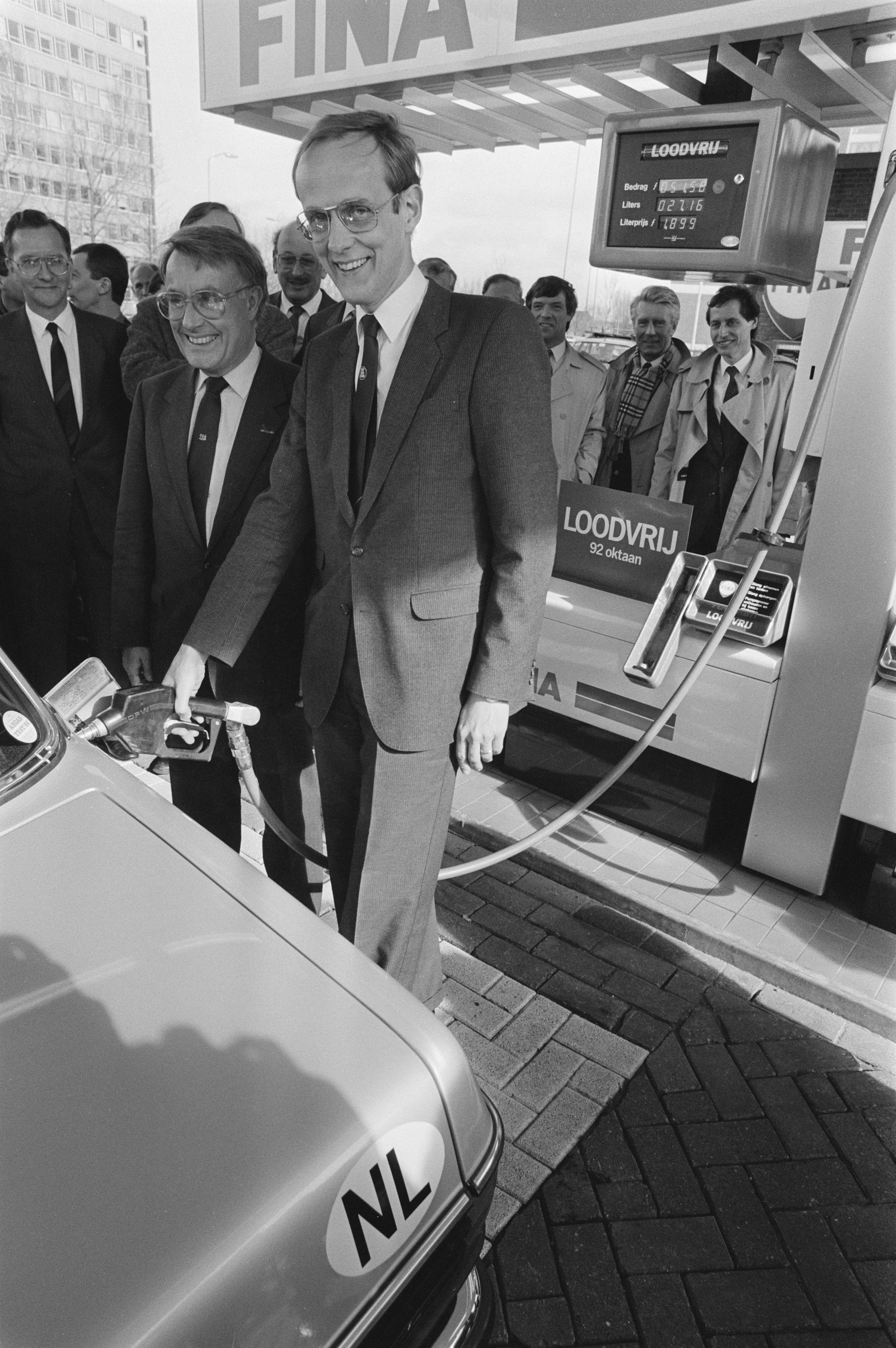 Collectie / Archief : Fotocollectie Anefo Reportage / Serie : [ onbekend ] Beschrijving : Minister Winsemius opent symbolisch 30 pompen voor loodvrije benzine; Winsemius tankt loodvrije benzine, links staatssecretaris Koning Datum : 15 april 1985 Trefwoorden : BENZINE, BENZINEPOMPEN, LOODVRIJ, openingen Persoonsnaam : Koning, Henk, Winsemius, Pieter Fotograaf : Bogaerts, Rob / Anefo Auteursrechthebbende : Nationaal Archief Materiaalsoort : Negatief (zwart/wit) Nummer archiefinventaris : bekijk toegang 2.24.01.05 Bestanddeelnummer : 933-2937